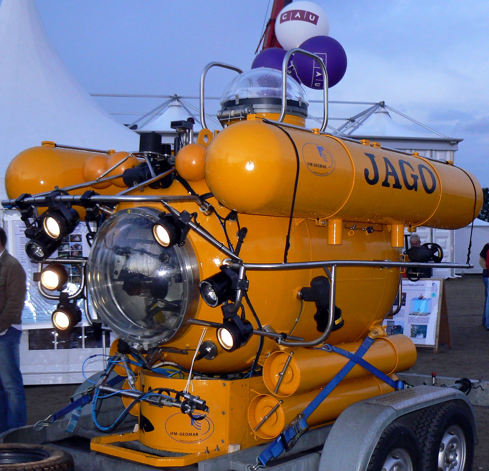 Forschungstauchboot JAGO des IFM-GEOMAR Kiel.